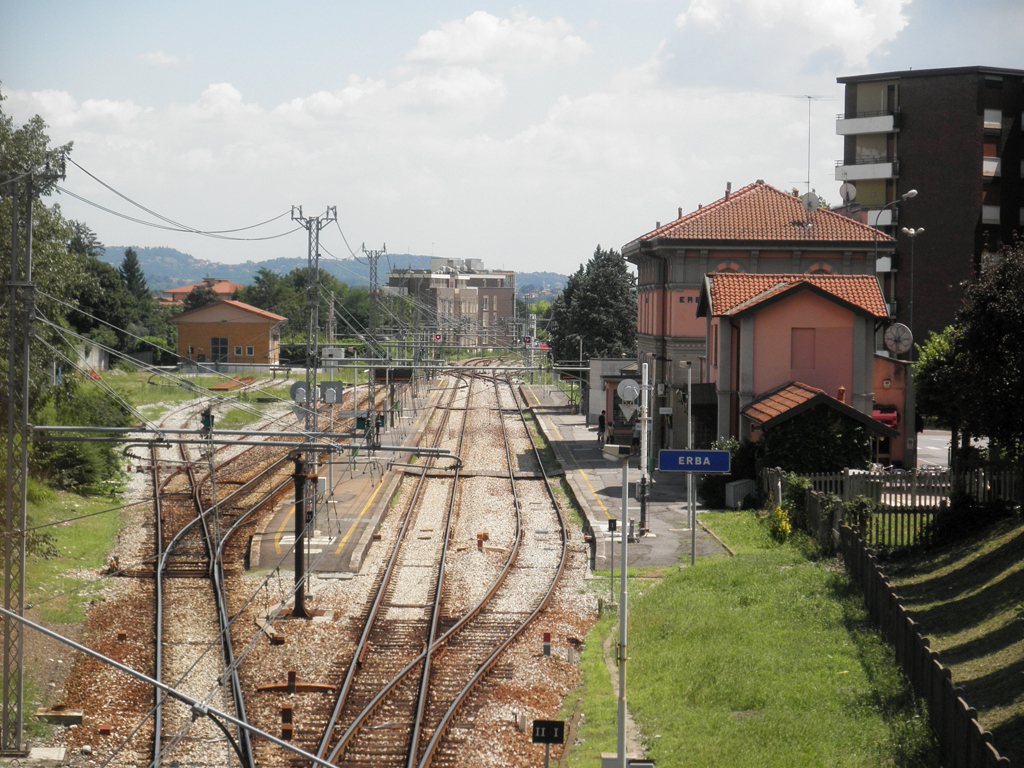 Stazione ferroviaria di Erba.